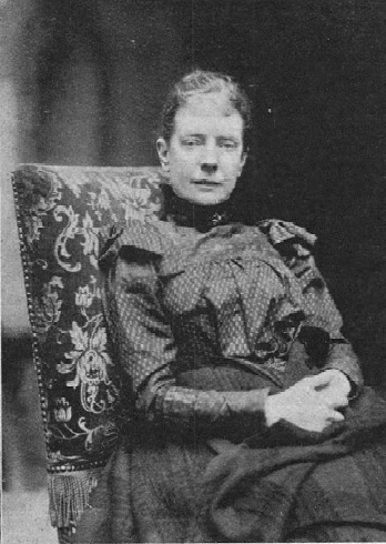 The swedish åldfru, mrs Zelma Berg, b. September 8, 1847 in Simtuna, d. January 18, 1919, in Södertälje.